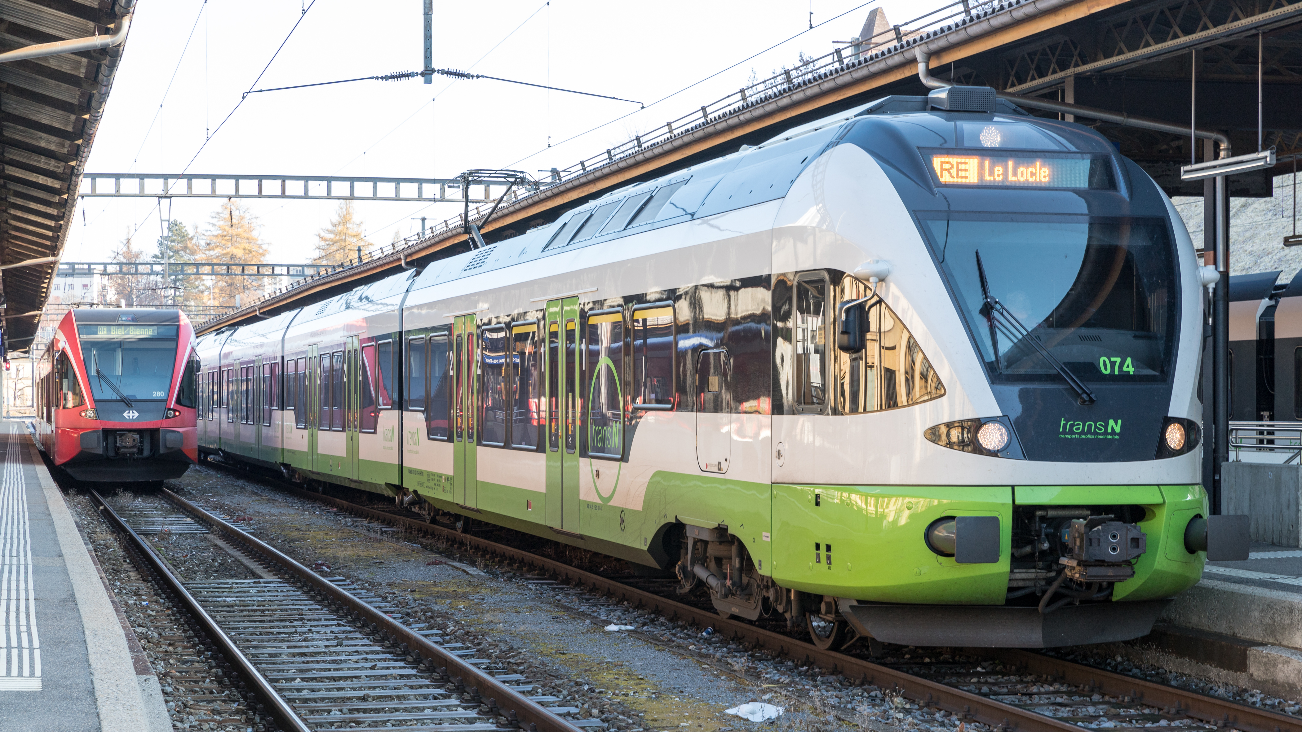 TransN RABe 523 074 als Regionalexpress nach Le Locle im Bahnhof La Chaux-de-Fonds